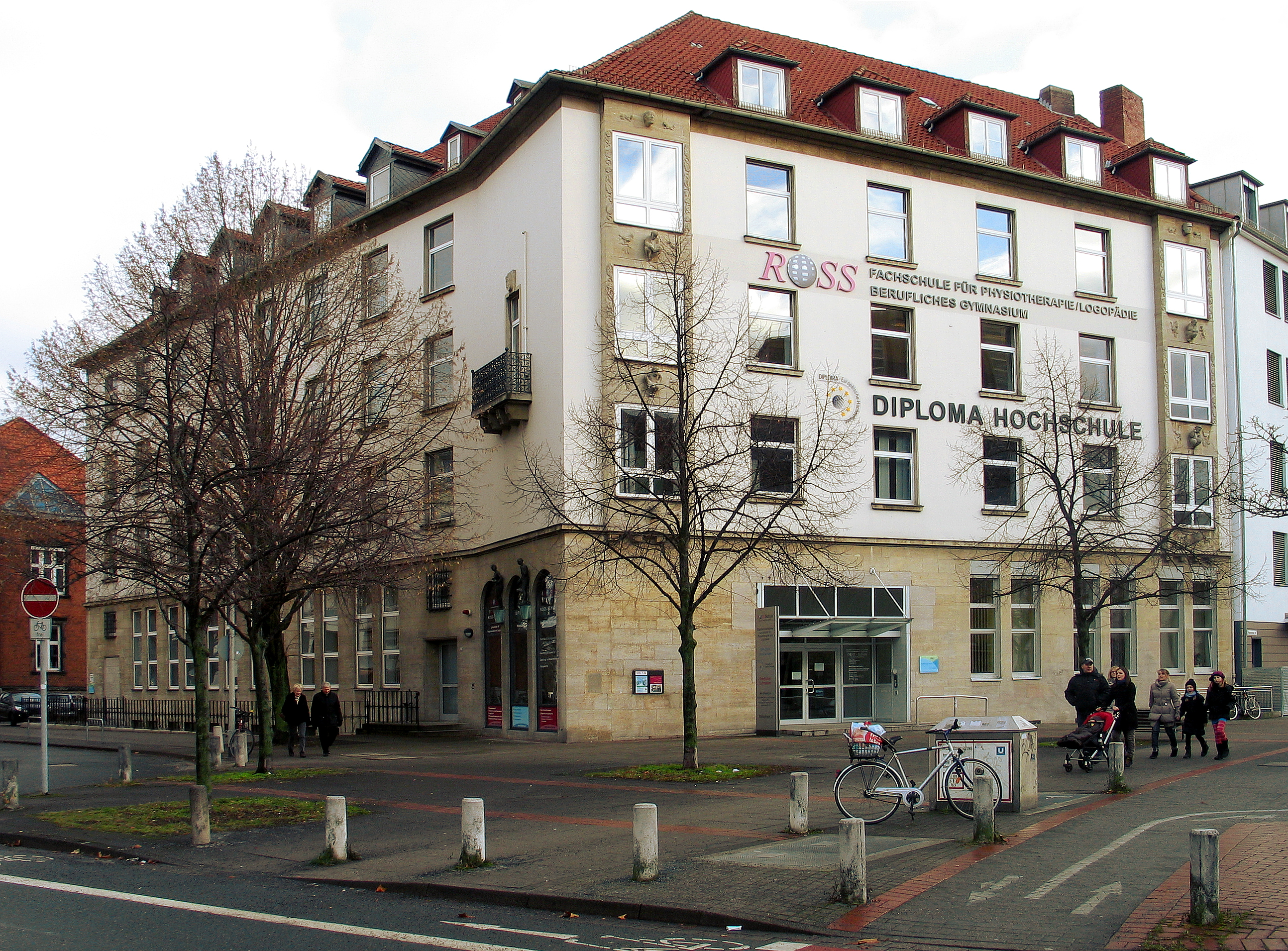 Das 1937 von dem Architekten Karl Siebrecht für die Kreissparkasse Hannover errichtete Gebäude unter der Adresse Wilhelmstraße 2 dient heute (Stand: 12/2012) der ROSS Fachschule für Physiotherapie/Logopädie, als berufliches Gymnasium und der DIPLOMA Europäische Hochschule ...